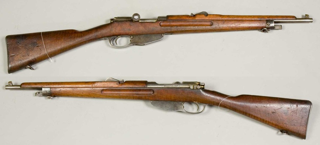 Nizozemska karabinka Mannlicher, model 1895. Izdelana je bila na Nizozemskem leta 1917.